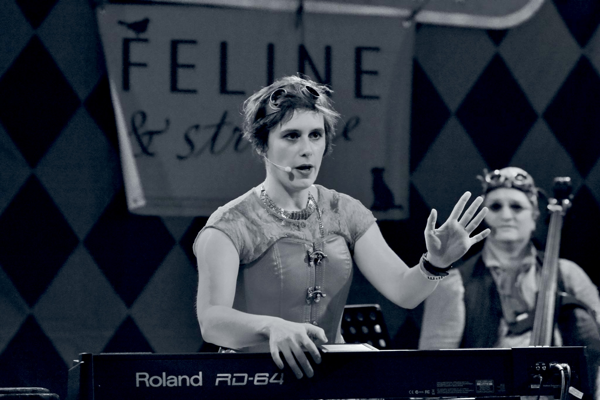 Die Band Feline & Strange live